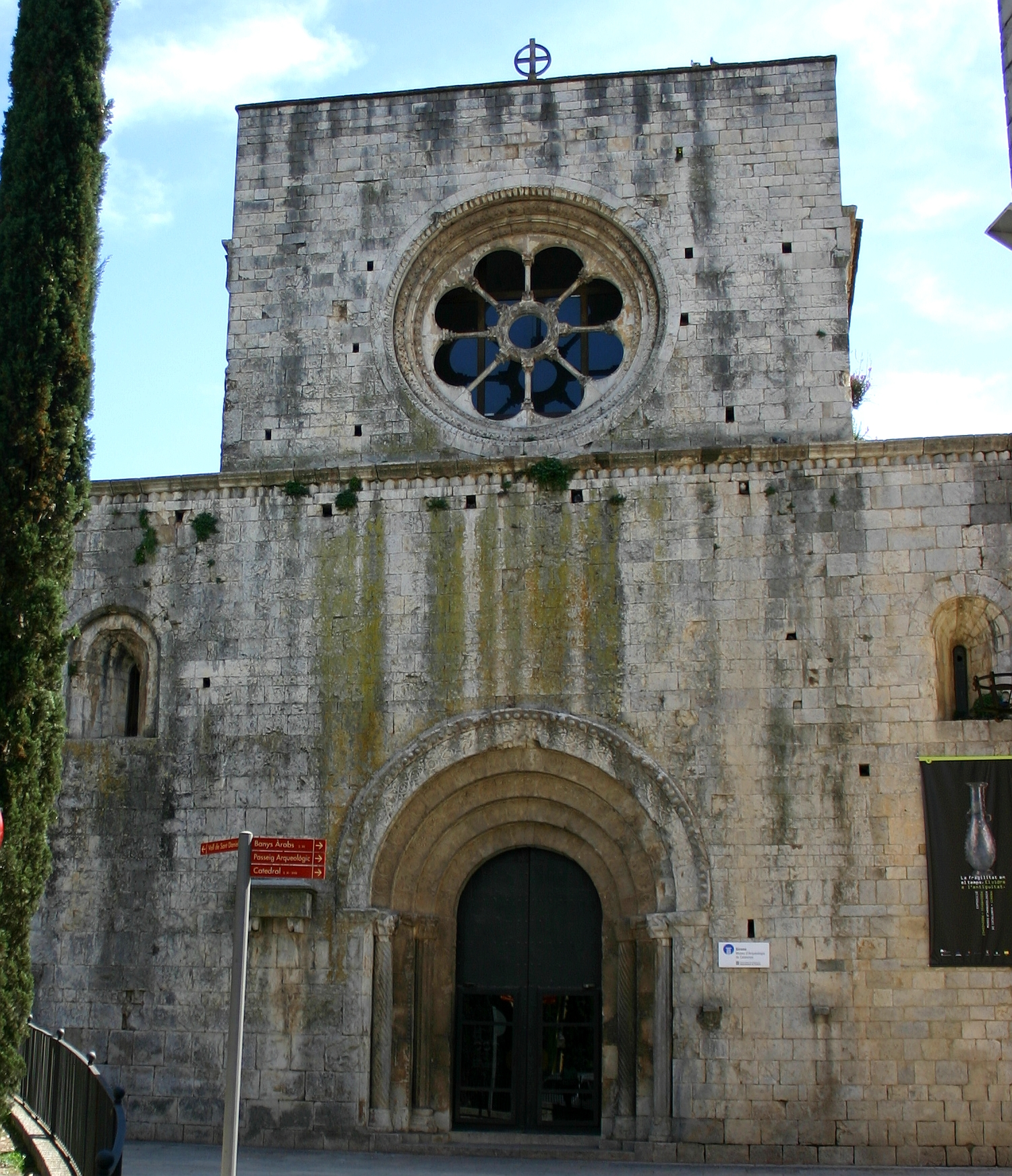 Museu d'Arqueologia de Catalunya a Girona.